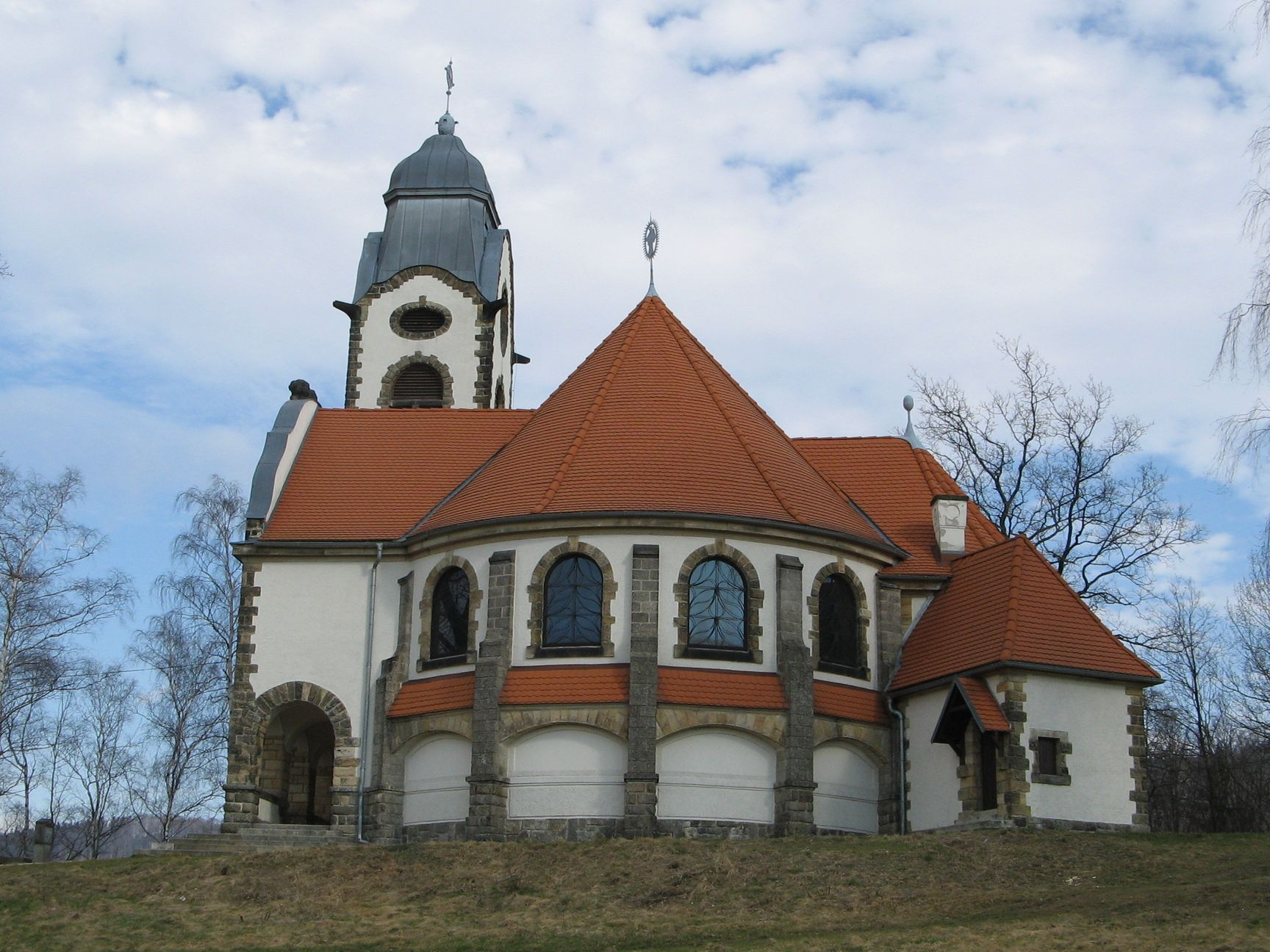 Kostel Matky Boží, U Obrázku, Liberec (městská část Ruprechtice)